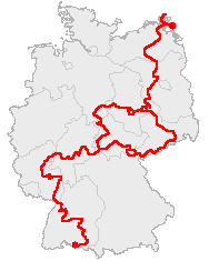 Course Map of Deutsche Alleenstraße